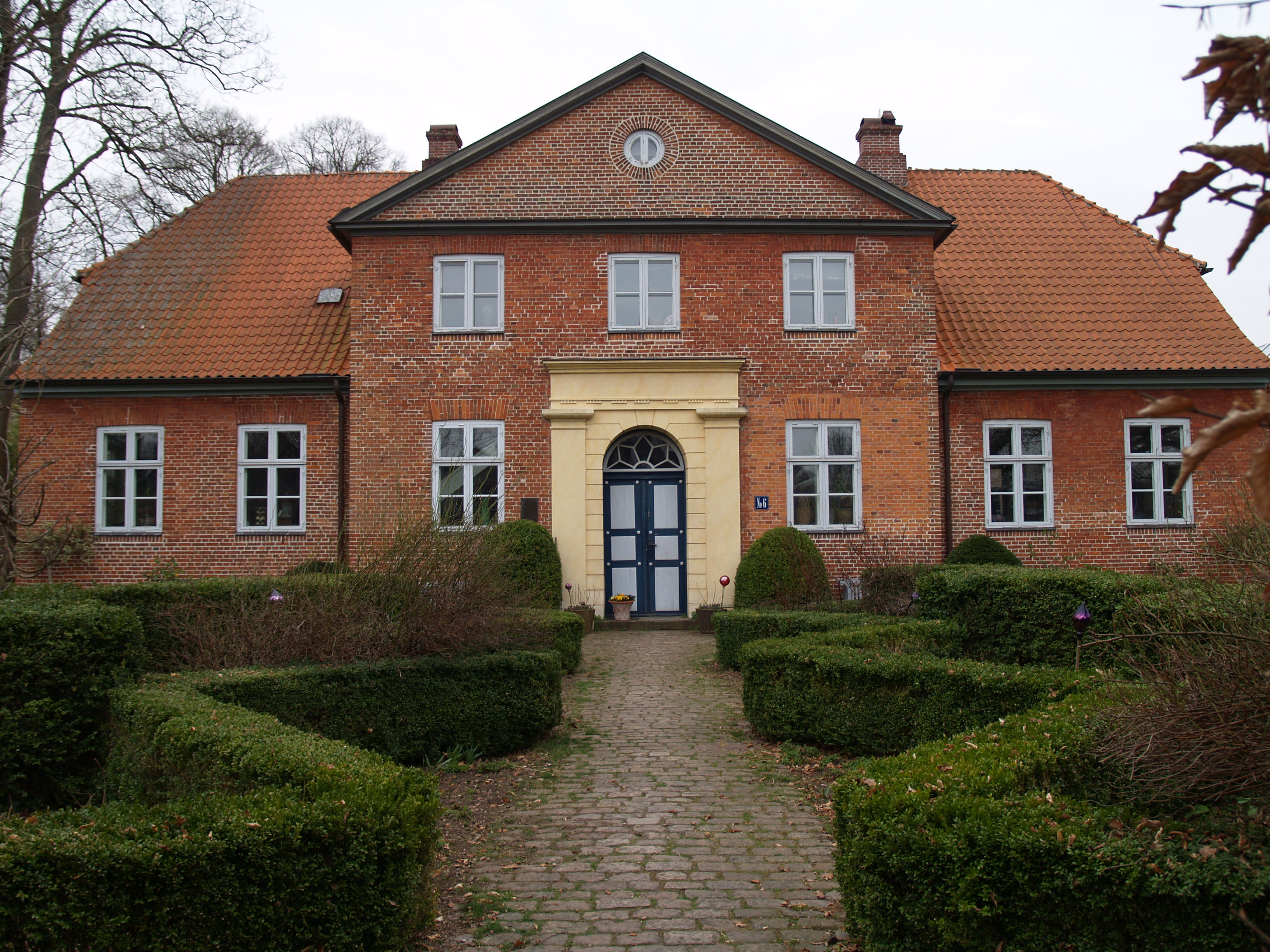 Amtsgericht in Trittau, Kreis Stormarn, Deutschland